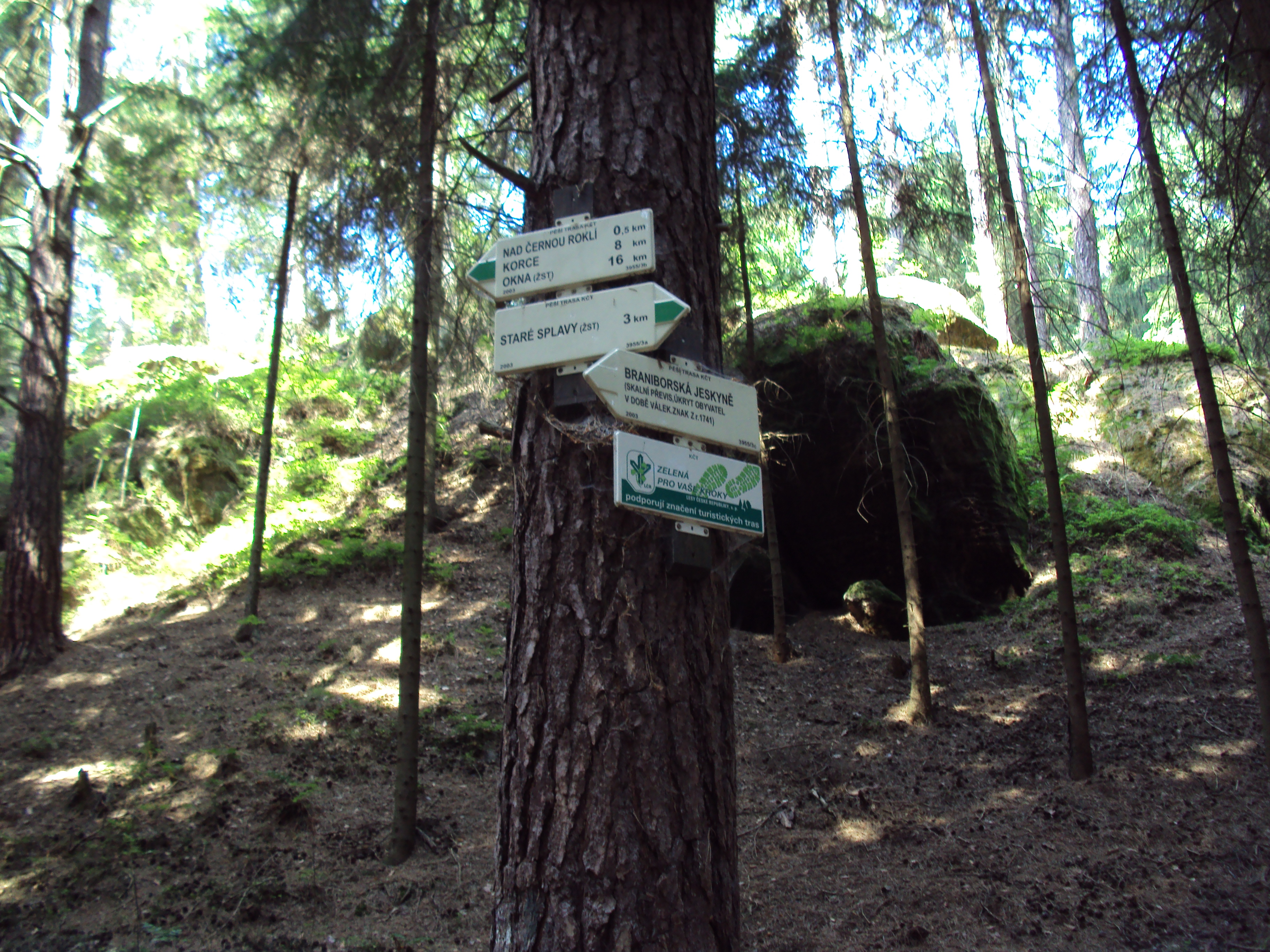 Česky: Rozcestník pod Braniborskou jeskyní